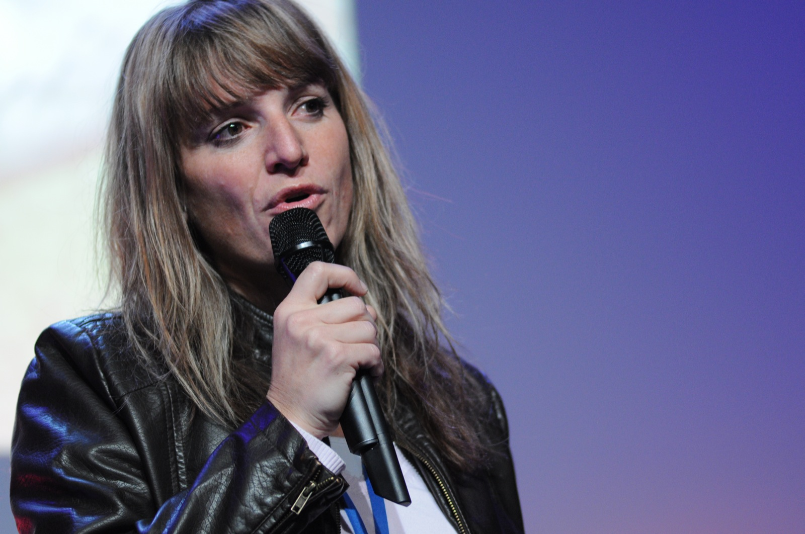 by